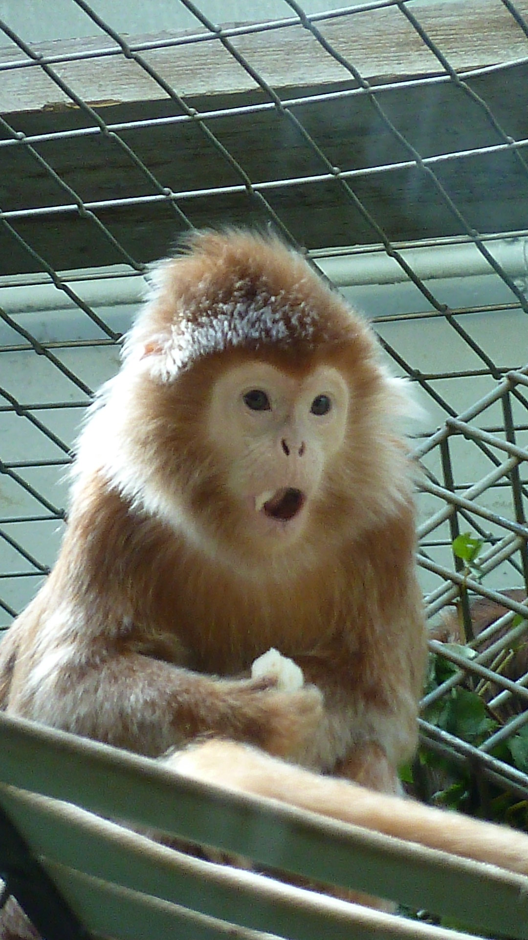 seltener Haubenlangur im Niederen Affenhaus